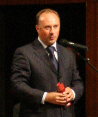 Dobrotvorni koncert "Križ nek' ti sačuva ime" u koncertnoj dvorani Vatroslav Lisinski u Zagrebu.